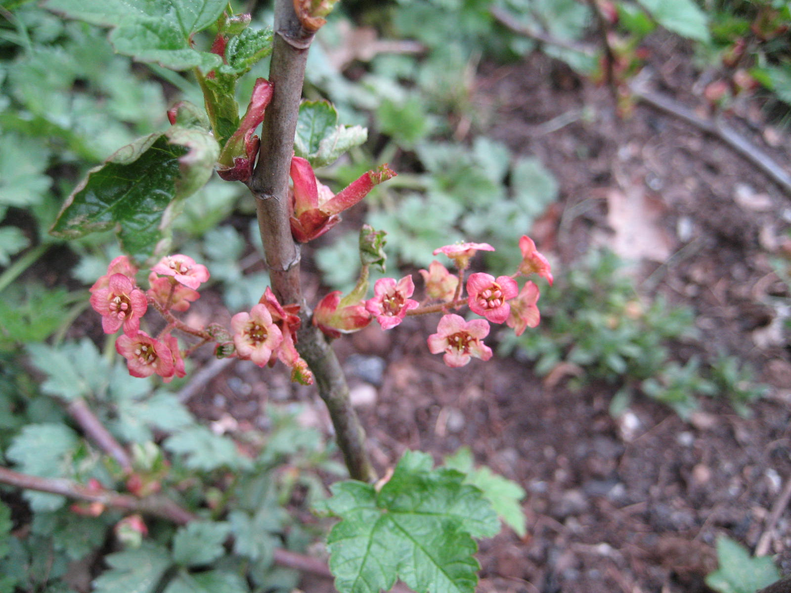 Ribes laxiflorum - Blüte - Bot. Garten Berlin Dahlem